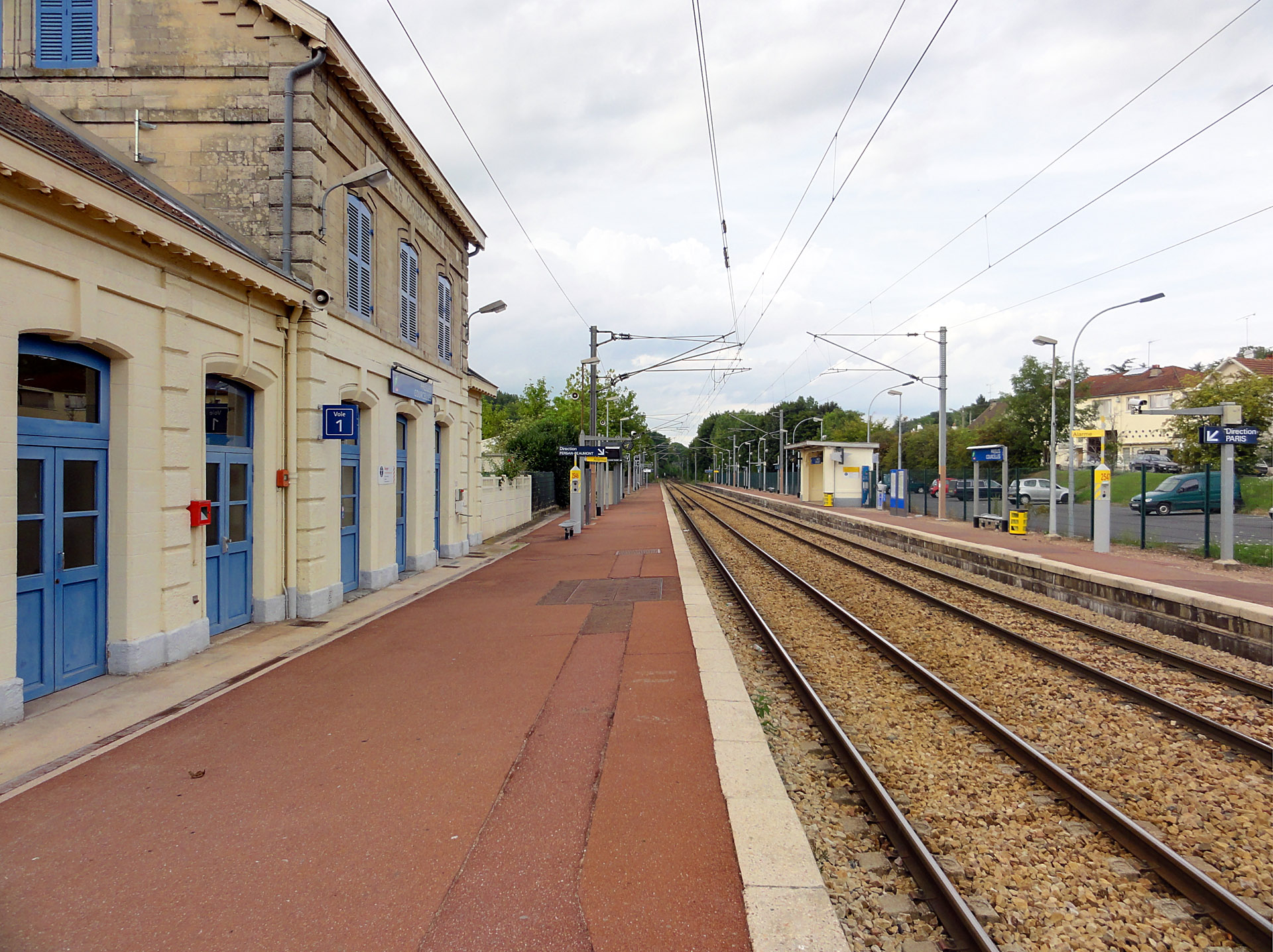 La gare de Presles - Courcelles, Val-d'Oise, France.